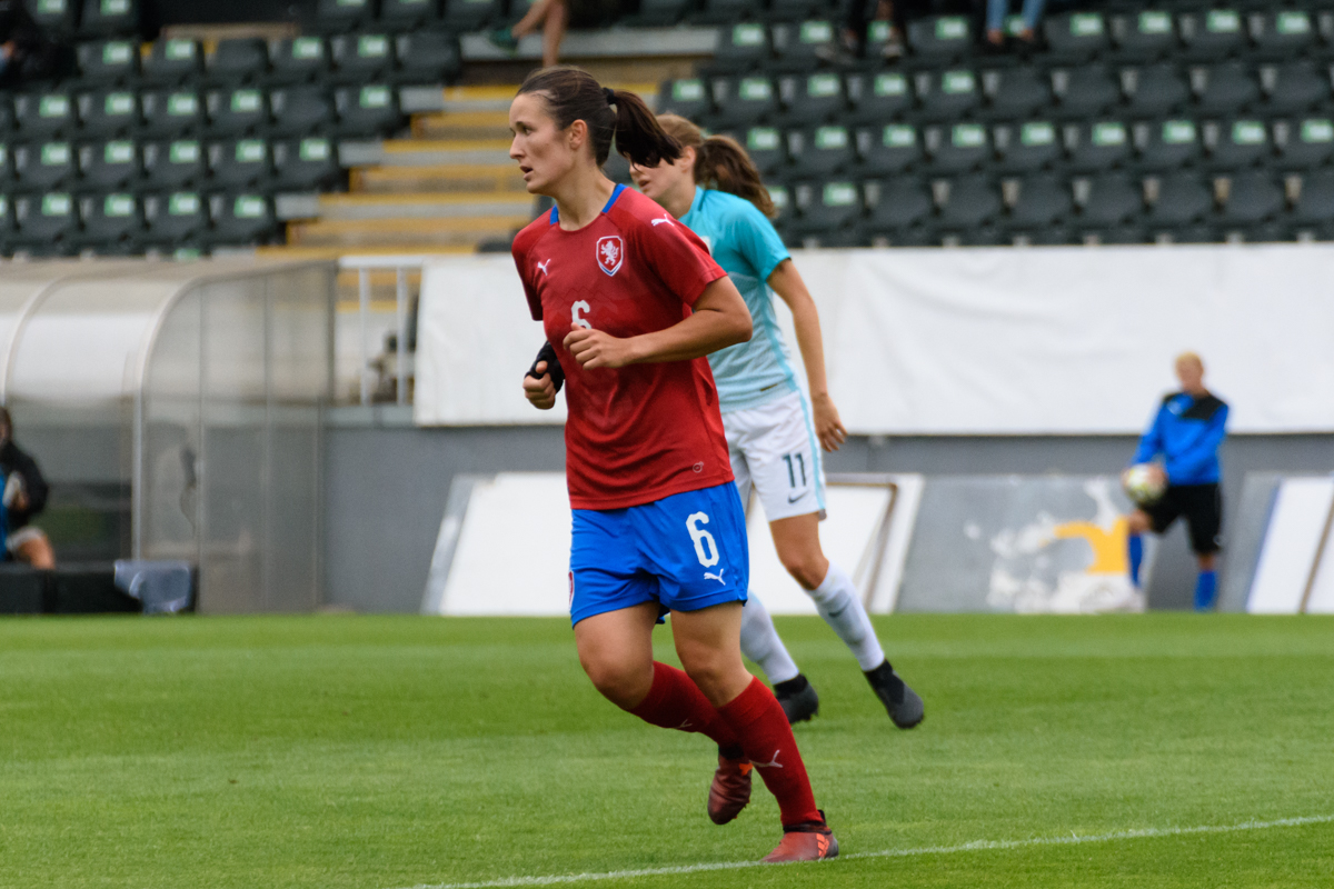 Eva Bartoňová vs Slovenia